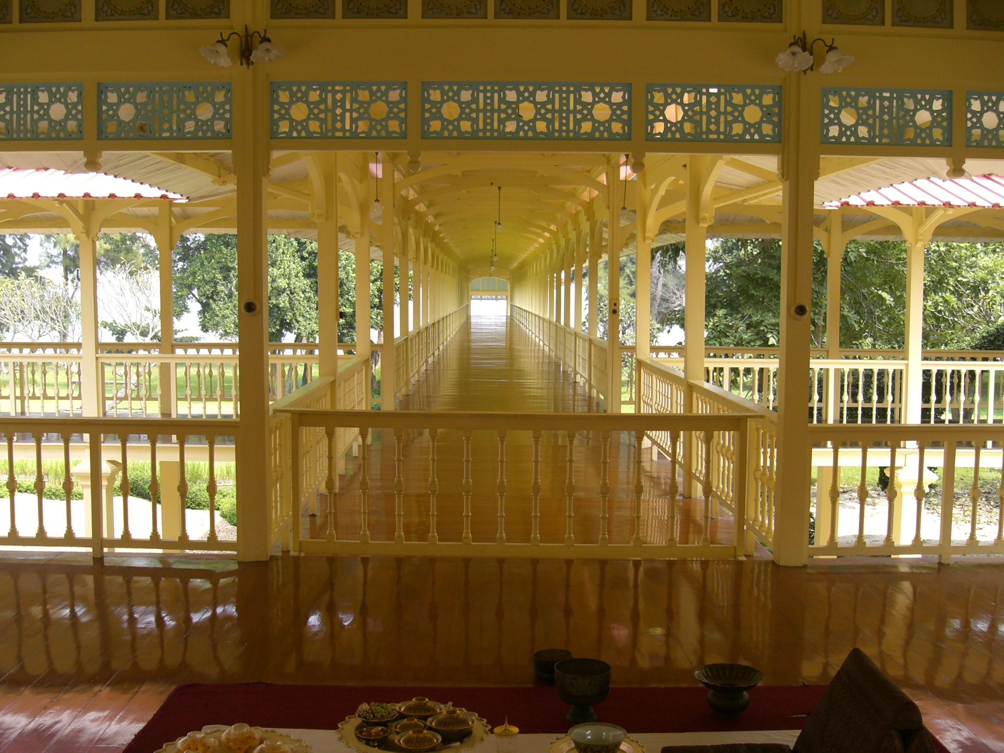 Phra Ratchaniwet Marukkhathaiyawan